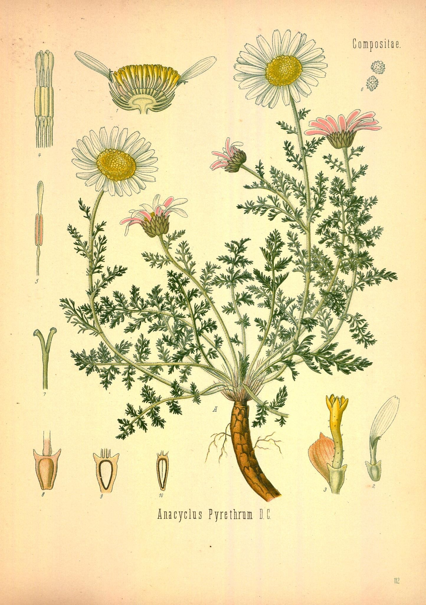 Mehrjähriger Bertram. A blühende Pflanze in natürl. Grösse; 1 Blüthenkorb im Längsschnitt, vergrössert; 2 Randblüthe, desgl.; 3 Scheibenblüthe mit Deckblatt, desgl.; 4 Staubgefässröhre, desgl.; 5 einzelnes Staubgefäss von innen, desgl.; 6 Pollen, desgl.; 7 Griffel mit Narben, desgl.; 8 eine Achäne der Scheibe, desgl.; 9 dieselbe in der Richtung der breiten Fläche längs durchschnitten, desgl.; 10 dieselbe in der Richtung der schmalen Fläche durchschnitten, desgl.